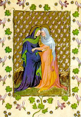 Page from codex «Libro d’Ore» (Bodmer Codex)